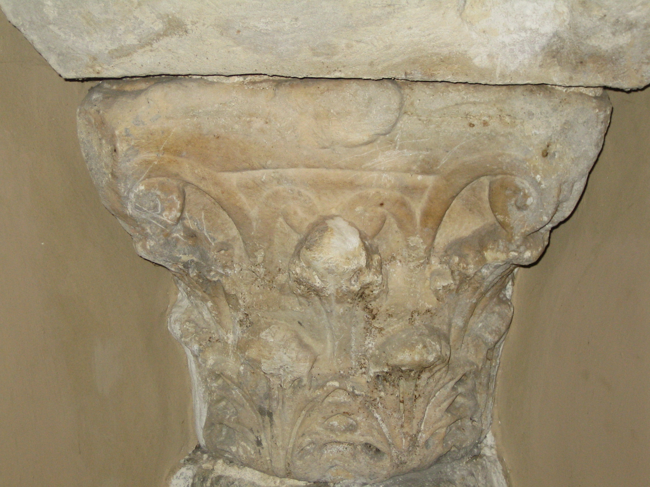 Capitello corinzio asiatico messo in opera nella chiesa di Madonna del Piano di Corinaldo (An)